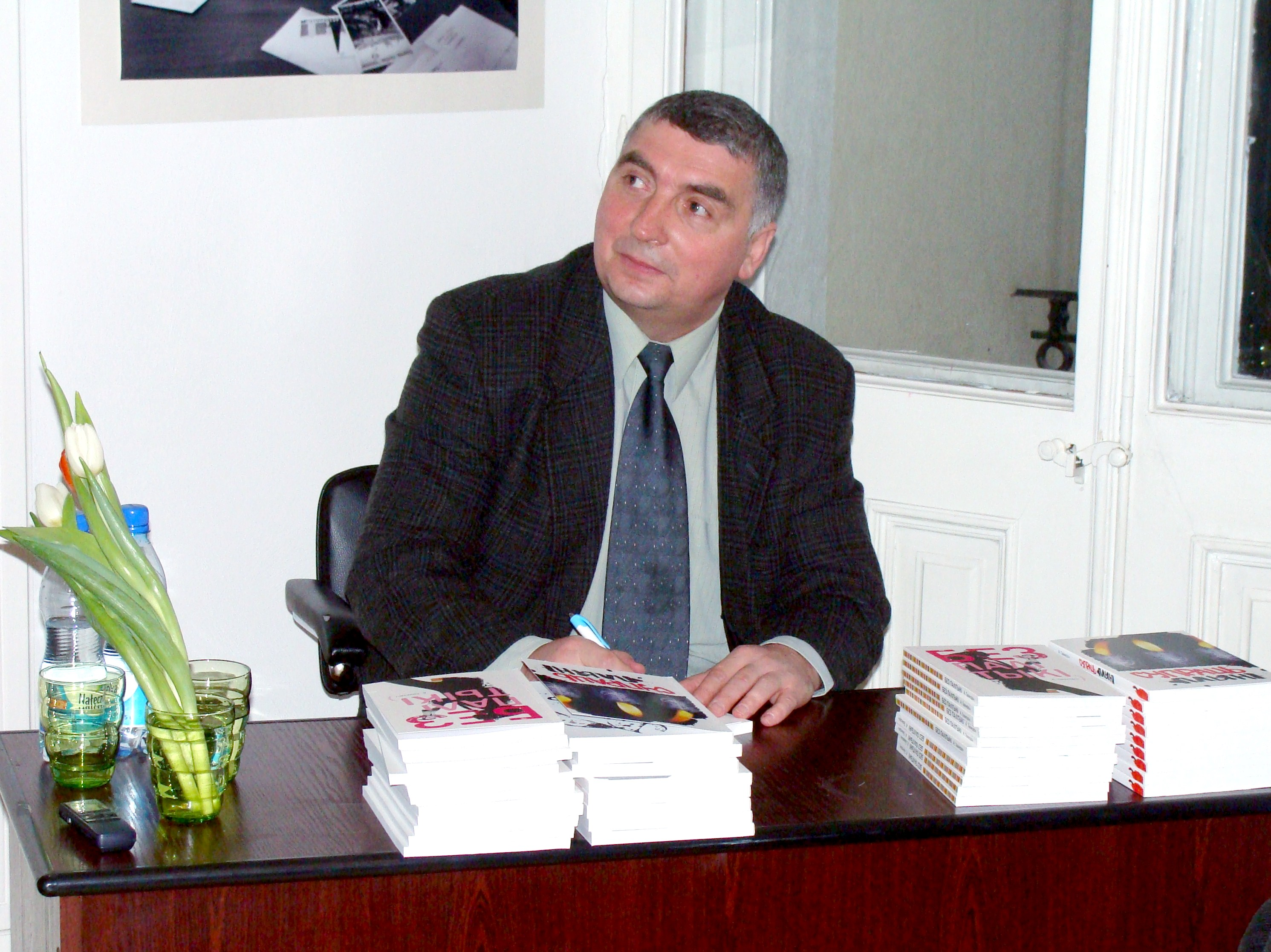 Białoruski dziennikarz Alaksandr Tamkowicz na spotkaniu w Białoruskim Domu na ul. Wiejskiej 13 w Warszawie podpisuje swoje książki.